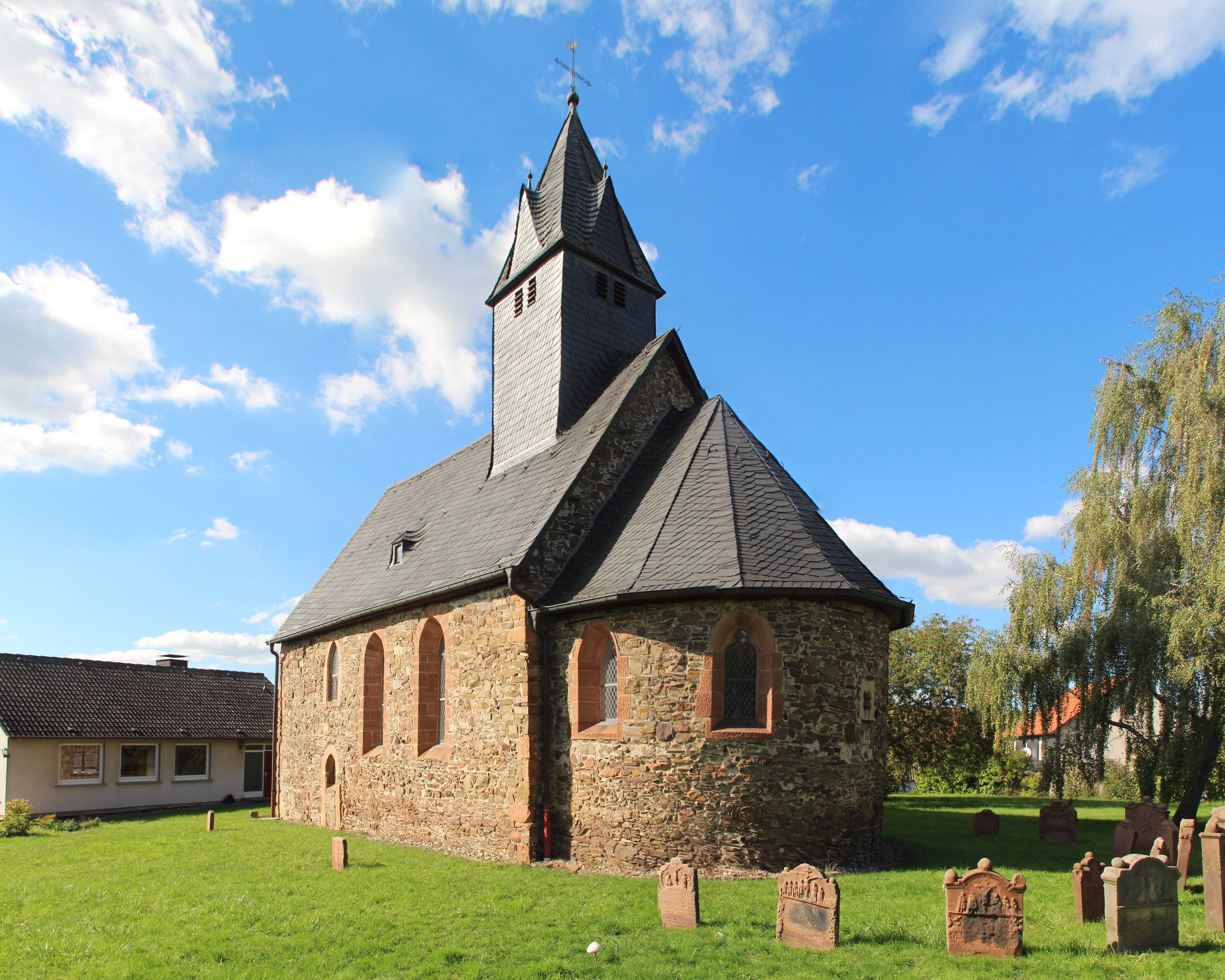 Oberwalgern